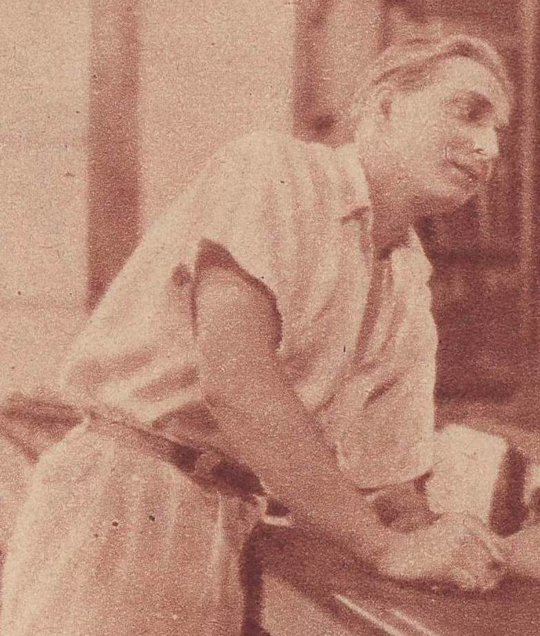 Czesław Wołłejko i Zofia Barwińska w sztuce „Szczeniaki”